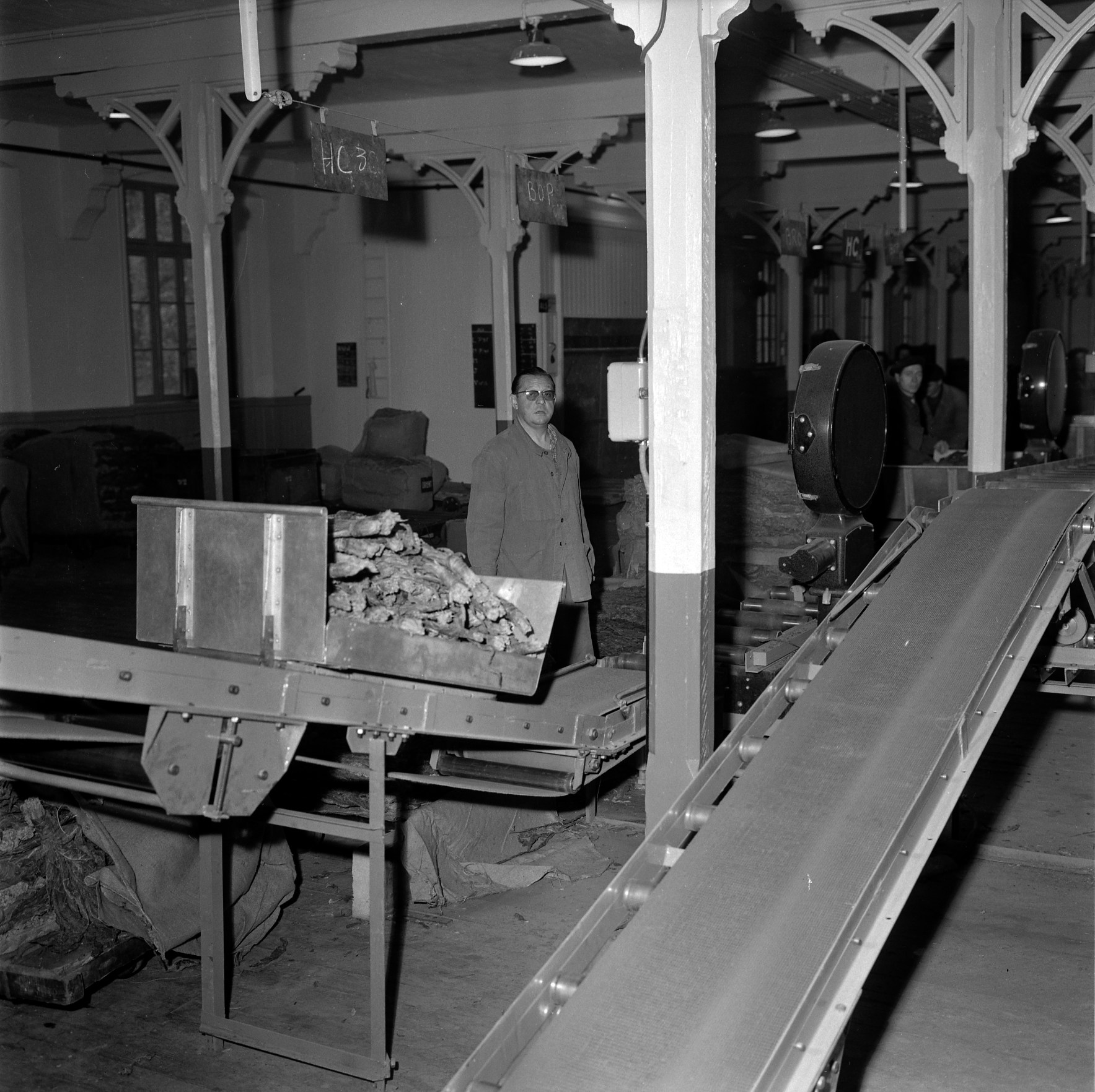 Manufacture des Tabacs. Le 21 Novembre 1961. Vue d'un ouvrier de la Manufacture des Tabacs devant sa machine.